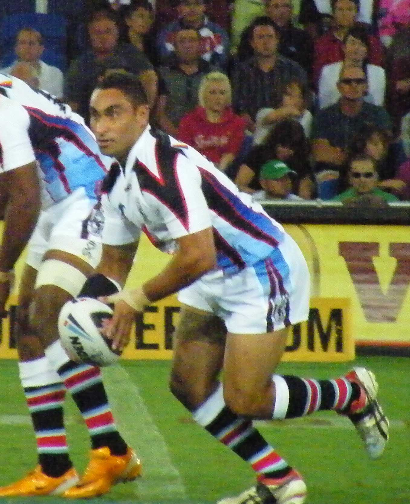 RLWC - Fiji v Ireland, Gold Coast 2008. Fijian Hooker James Storer.